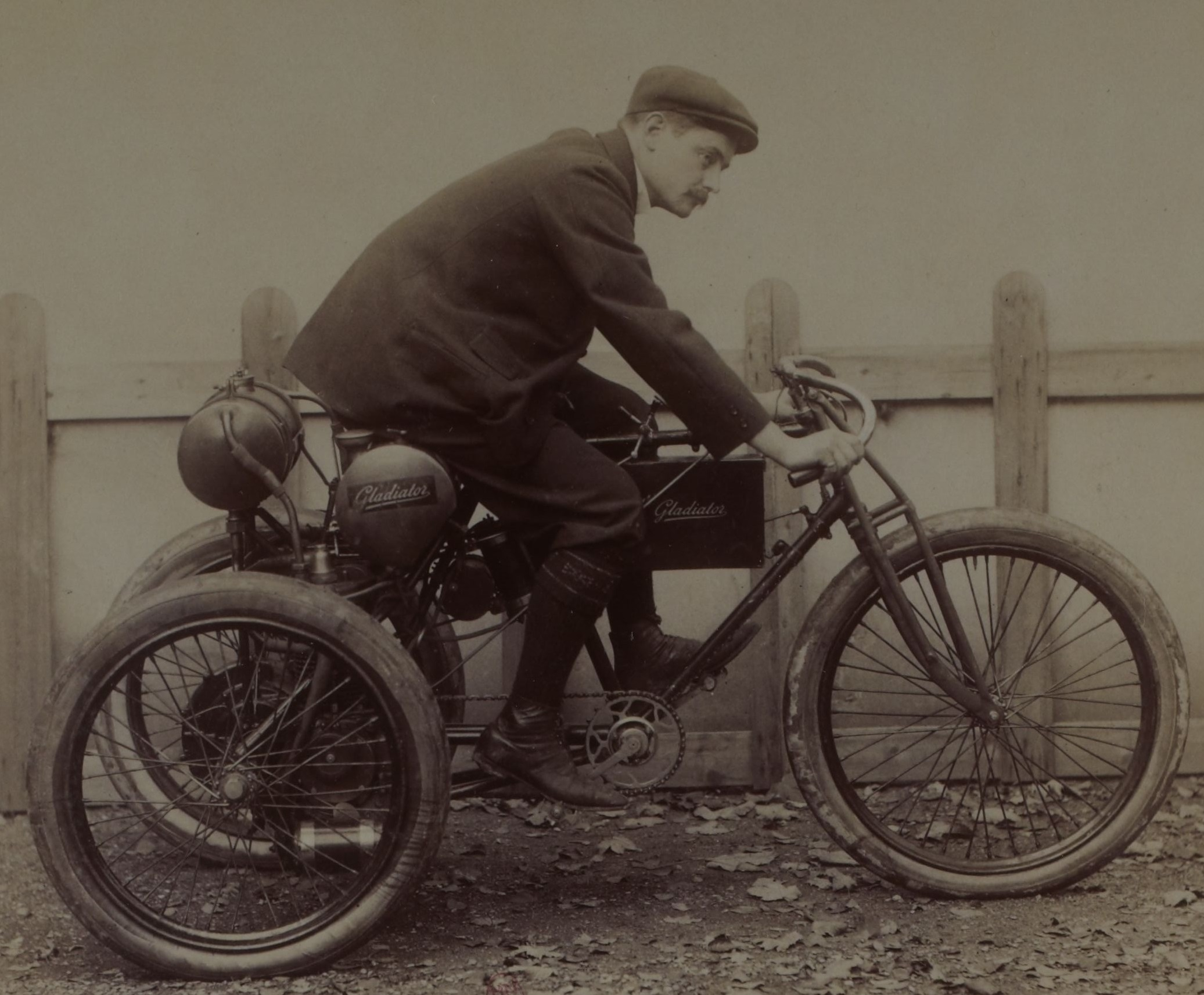 [Collection Jules Beau. Photographie sportive] : T. 12. Années 1899 et 1900 / Jules Beau : F. 5. Demester [ ? ]